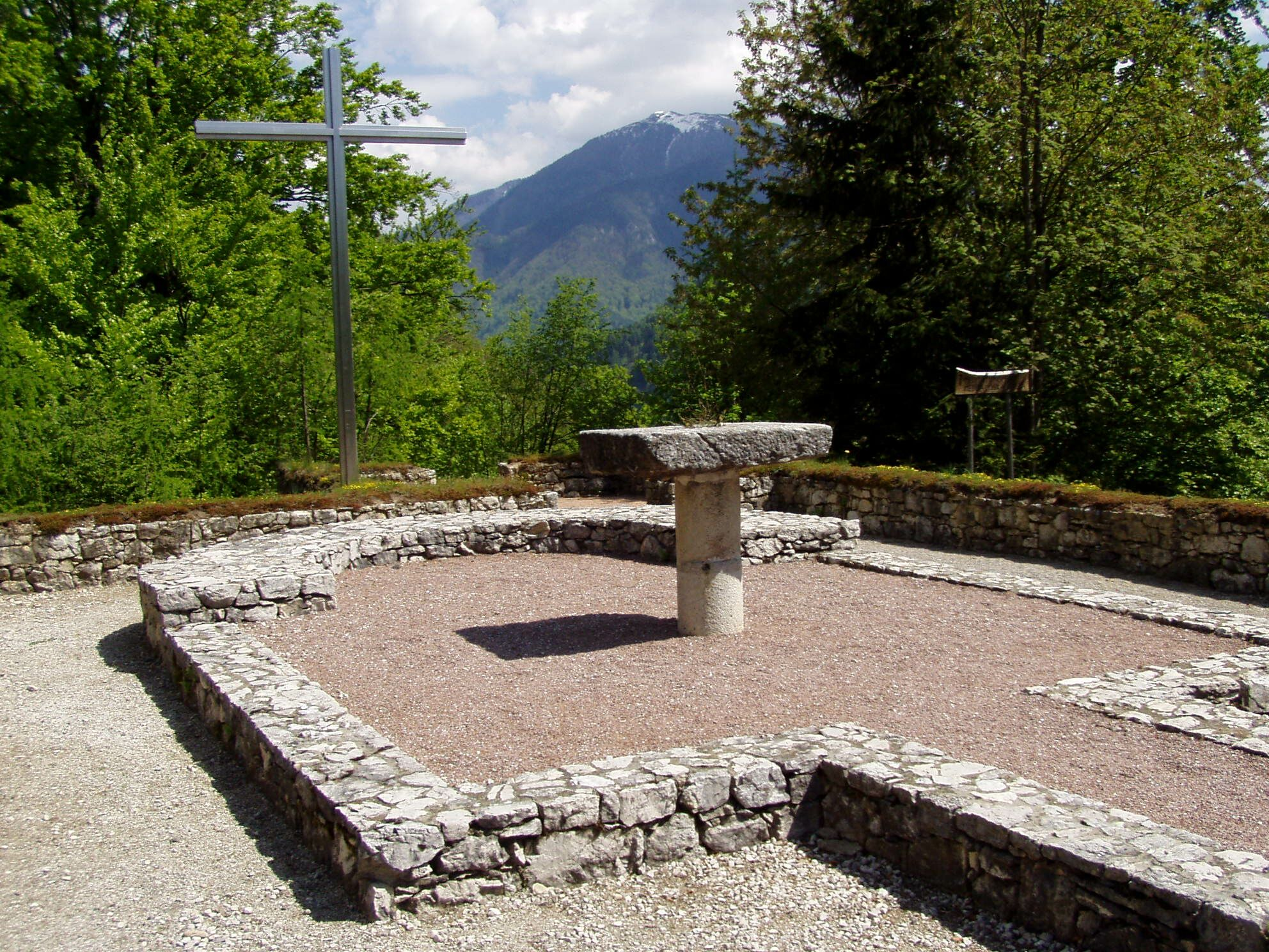 Hemmaberg, Carinthia. Östliche Doppelkirche: Gemeindekirche: Presbyterium und Priesterbank